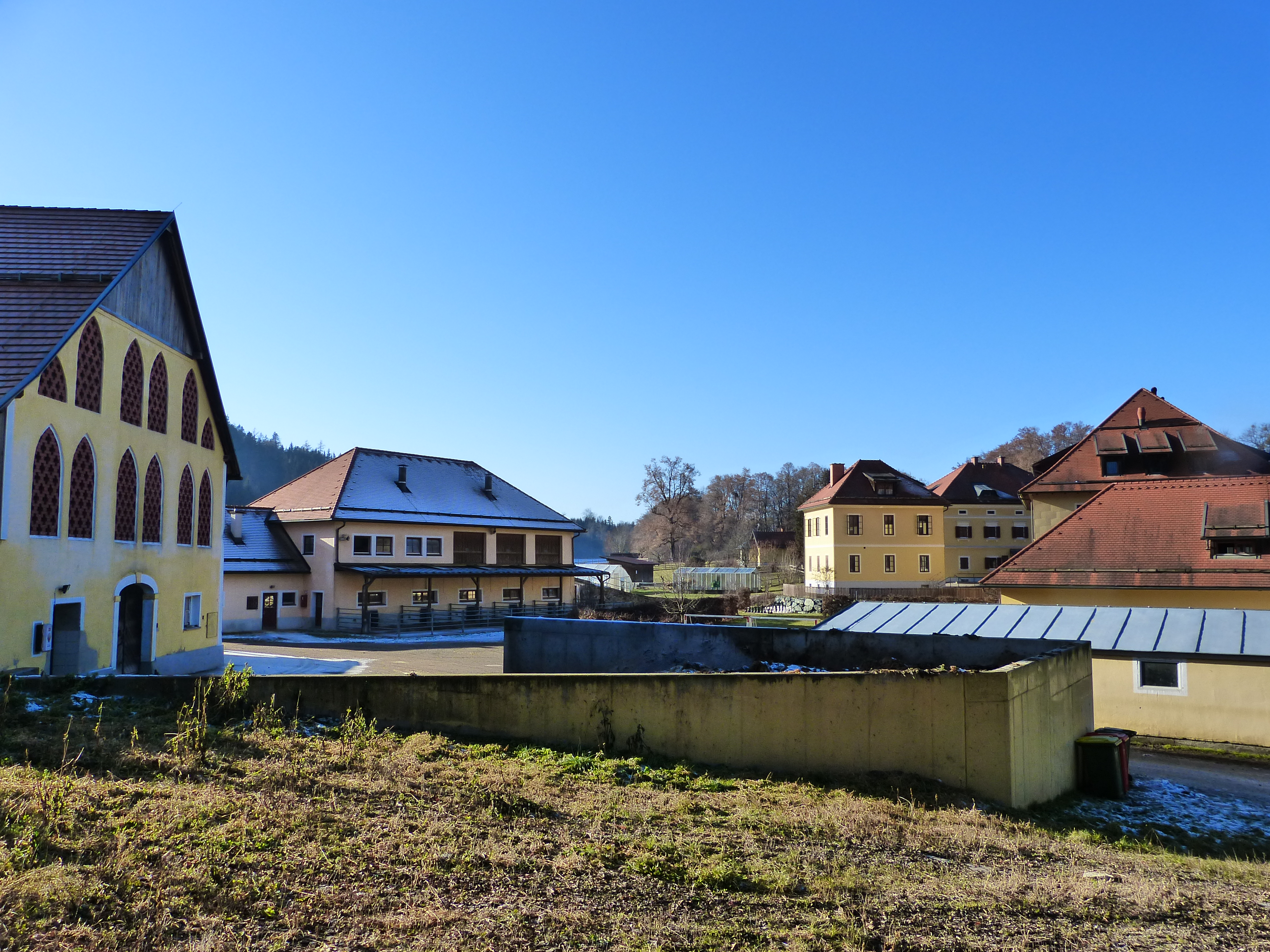 Meierhof / Ökonomie Rottenstein: ganz links Ziegelgitterstadel (Haus Nr. 1a). ganz rechts: Dach von Nr. 1; dahinter Dach mit Dachfenstern von Nr. 12, dahinter (teilweise verdeckt) Nr. 2.